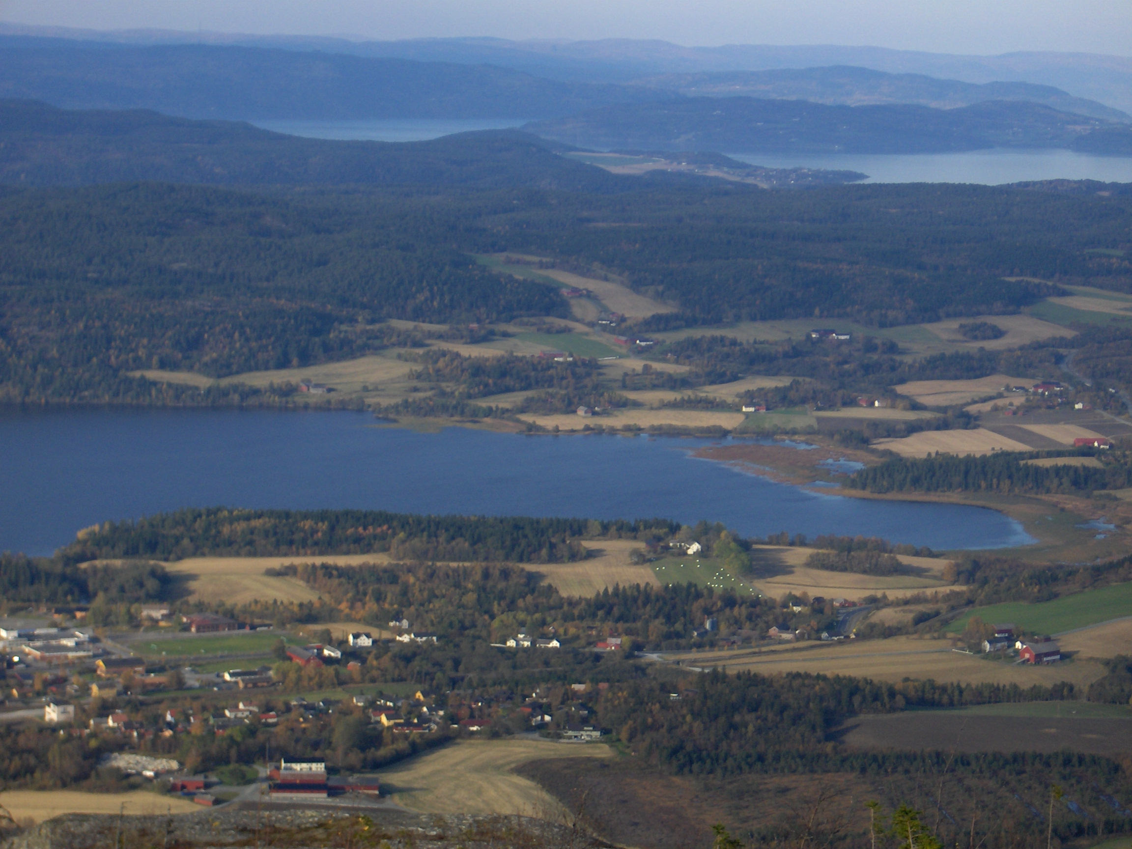 Deler av Åsen sentrum sett fra Stokkvola.